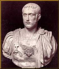 Immagine di Volusiano